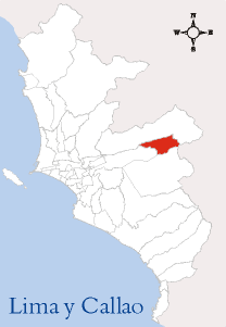 Localización del distrito de Chaclacayo Esta imagen ha sido elaborada por --Edgardo Reyes 18:23 9 mar, 2005 (CET) Categoría:Mapas del Perú (imagen)